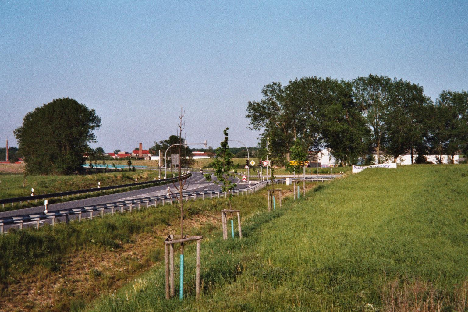 Kreuzung der B192 mit der B193, Blick Richtung Ost, von links kommend die B192, im Hintergrund die Stadt Penzlin